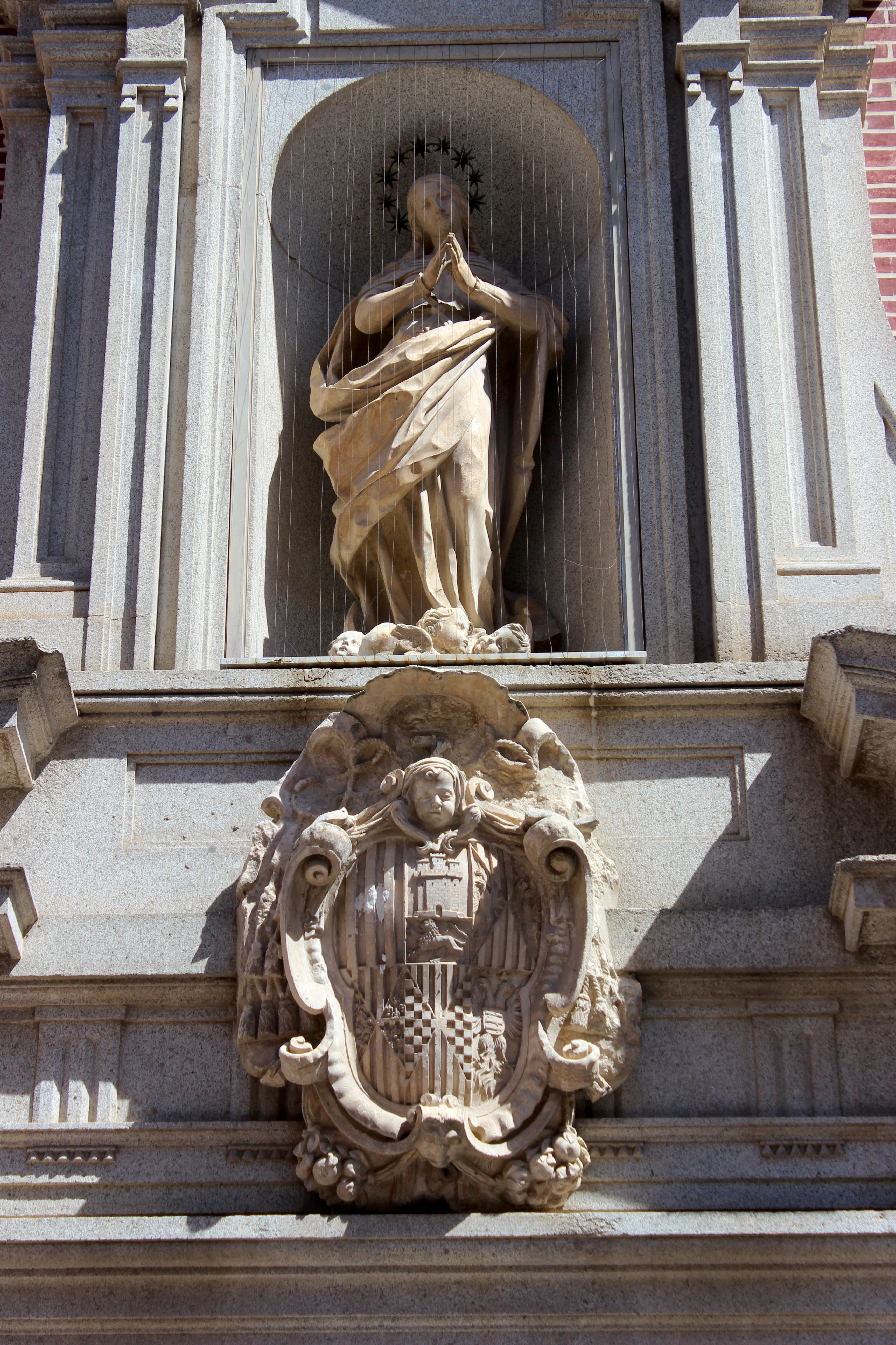 Toledo. Convento de la Purísima Concepción.